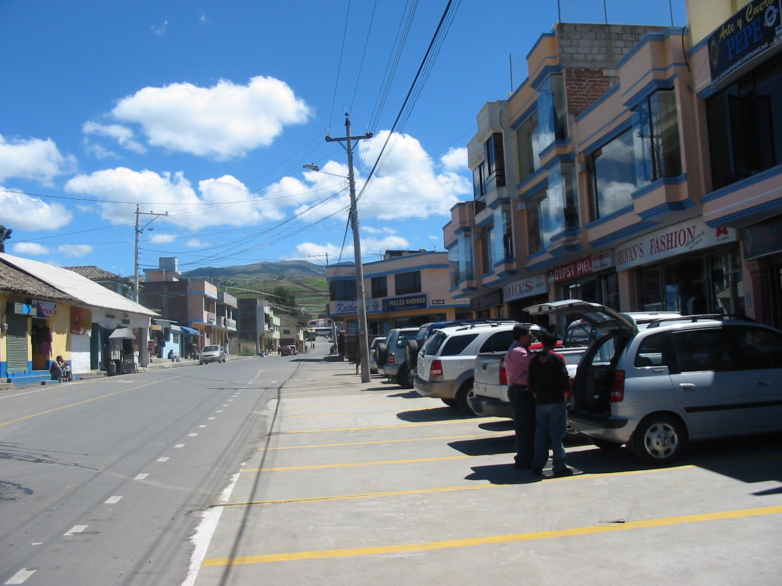 Quisapincha Town - Famous for his leather sales. El pueblo de Quisapincha. Famoso por sus articulos de cuero.